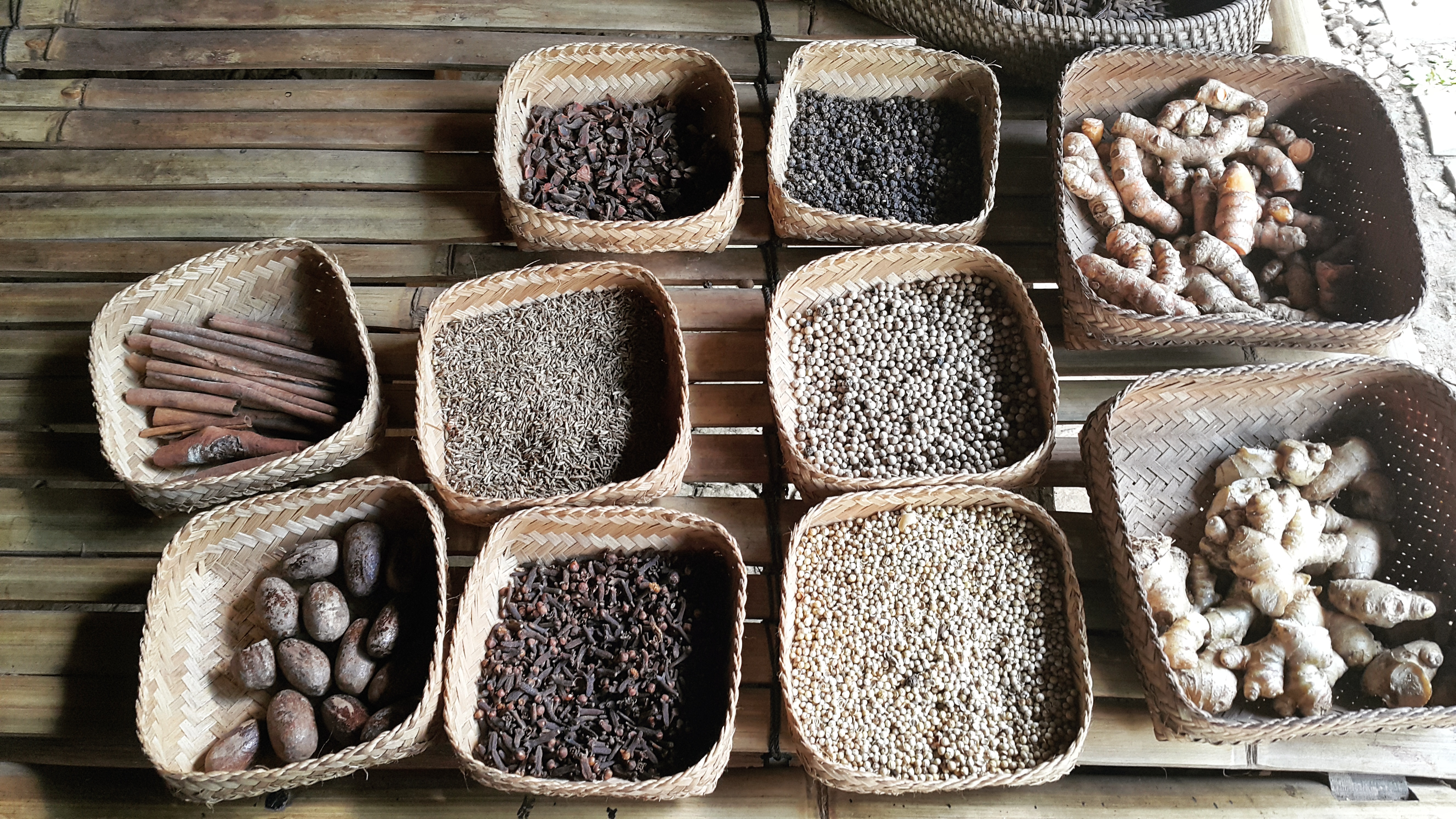 Gambar ini berisi beraneka macam rempah-rempah yang terdapat di Bali, Indonesia, sepertu cengkeh, kayu manis, pala, jahe, dan lain sebagainya. Rempah-rempah ini menjadi bahan utama masyarakat Indonesia untuk memasak berbagai masakan khas Indonesia yang autentik.